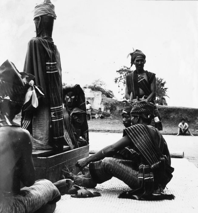 Negatief. Si gale gale is een houten pop die tijdens een dodenfeest de nakomelingen representeert van een man die zonder nageslacht is. Stierf een man zonder nageslacht of waren zijn kinderen vóór hem gestorven dan kon het geweeklaag en de begrafenis niet volgens de adat doorgevoerd worden met als gevolg dat de geest van de dode in het dodenrijk een ondergeschikte positie zou innemen. Met behulp van de pop kon er wel een begrafenis gehouden worden volgens de adat (Sibeth 1991:79).. Si gale gale dans te Simanindo